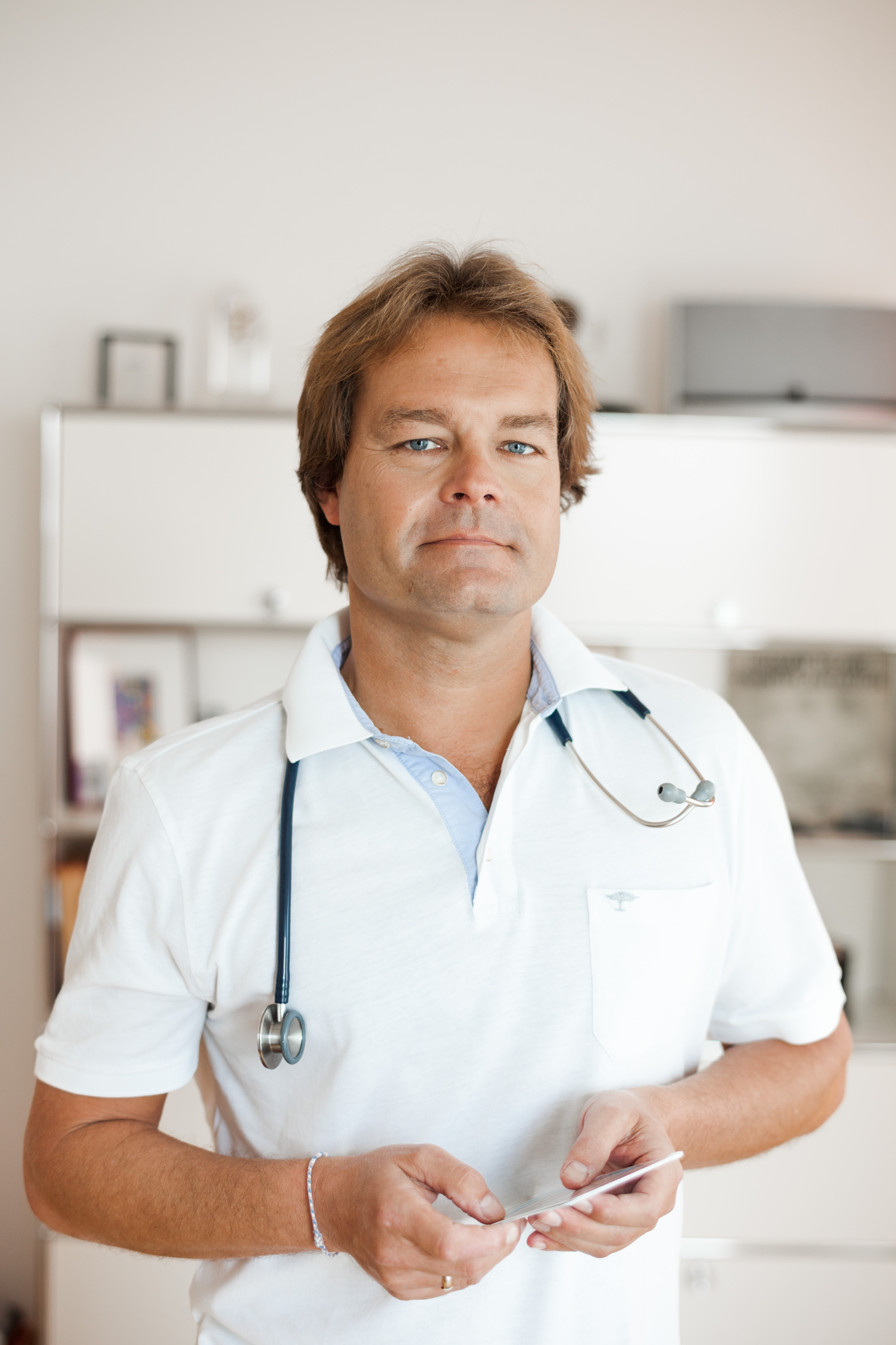 Portraits von Dierk Heimann